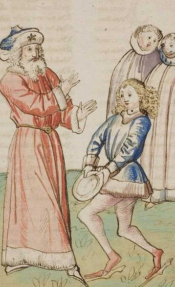 Hertog en zoon, bij ene gedicht van Augustijnken uit ca. 1400